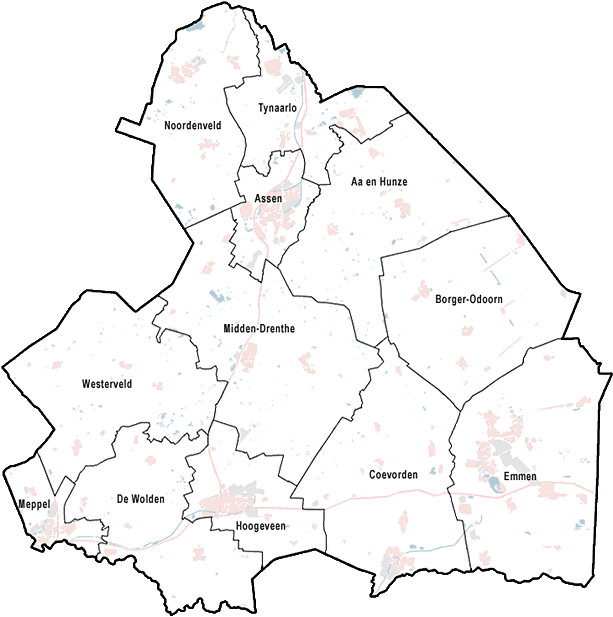 Provincie Drenthe, met indeling van gemeenten (2010). Door Jan-Willem van Aalst, samengesteld uit publiek beschikbare geo-data: Referentie-ondergrond (kustlijn, steden, wegen) gerasterd uit de OpenStreet Map OSM. ( Inhoud is beschikbaar onder de Creative Commons Attribution-ShareAlike 3.0 license. Vectorgrenzen van gemeenten en regio's vrij ter beschikking gesteld met dank aan cartografen van brandweerregio's Hollands-Midden en IJsselland; gerasterd in Photoshop. Overige kenmerken op de kaart: eigen tekenwerk van Jan-Willem van Aalst, op basis van gerasterde gemeentegrenzen.